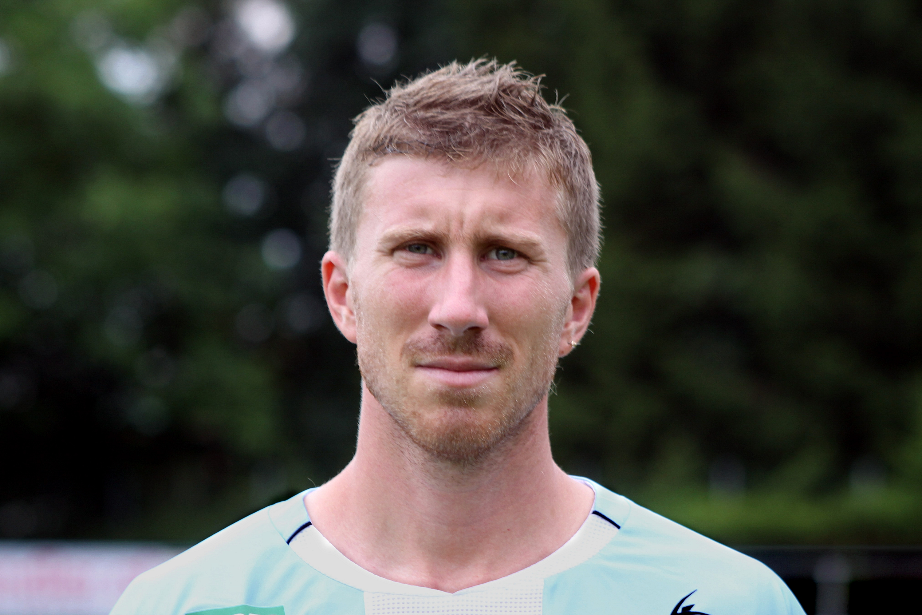 Tamas Somorjai - TSV Hartberg (2)